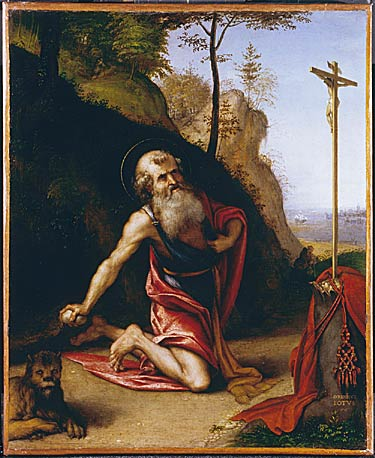 San Girolamo